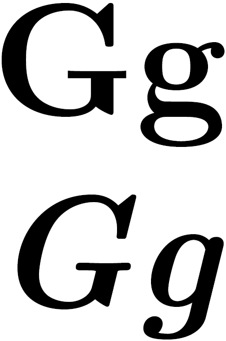 Latin letter G